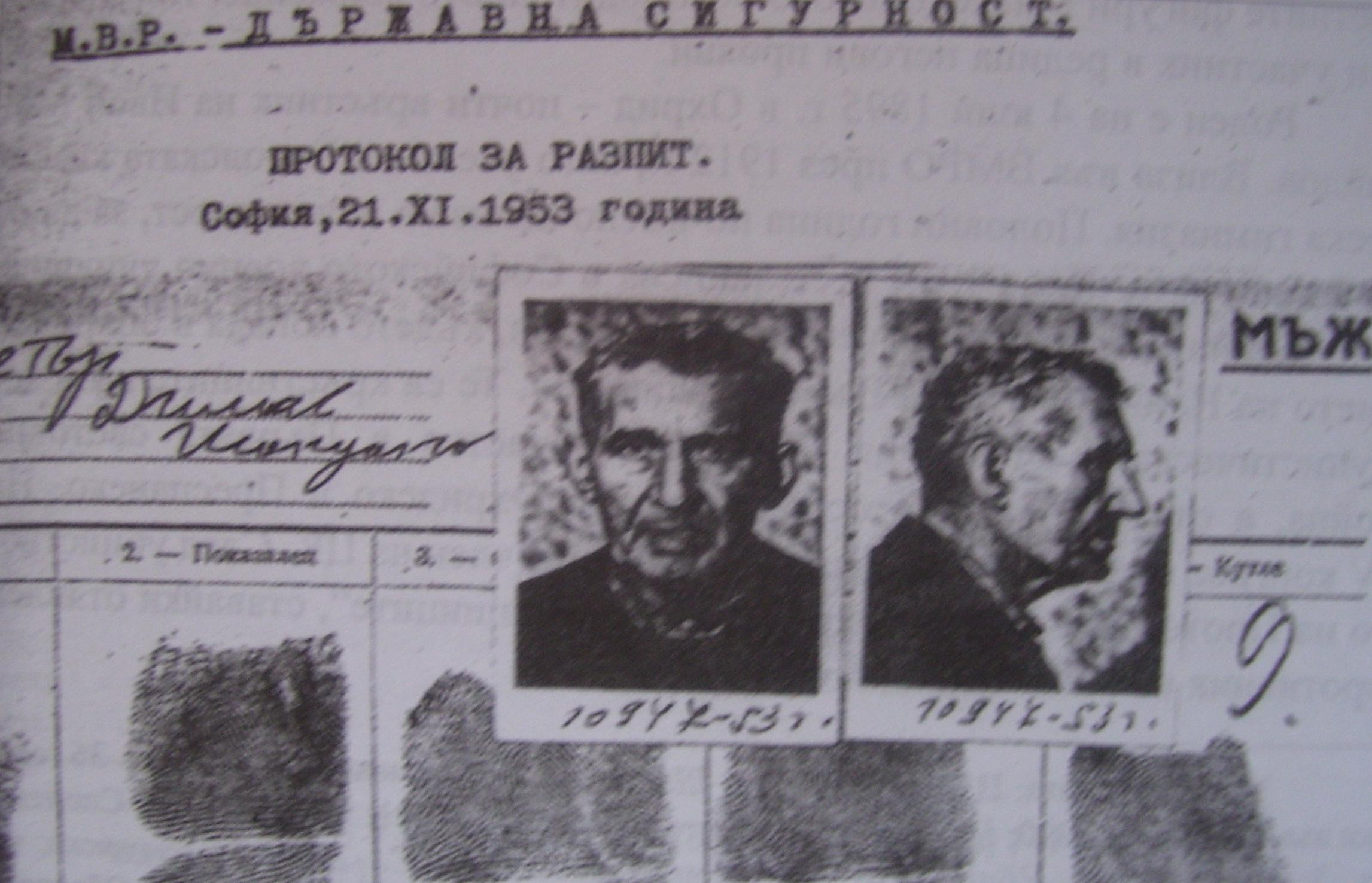 Протокол за разпит на Петър Шанданов в Държавна сигурност.